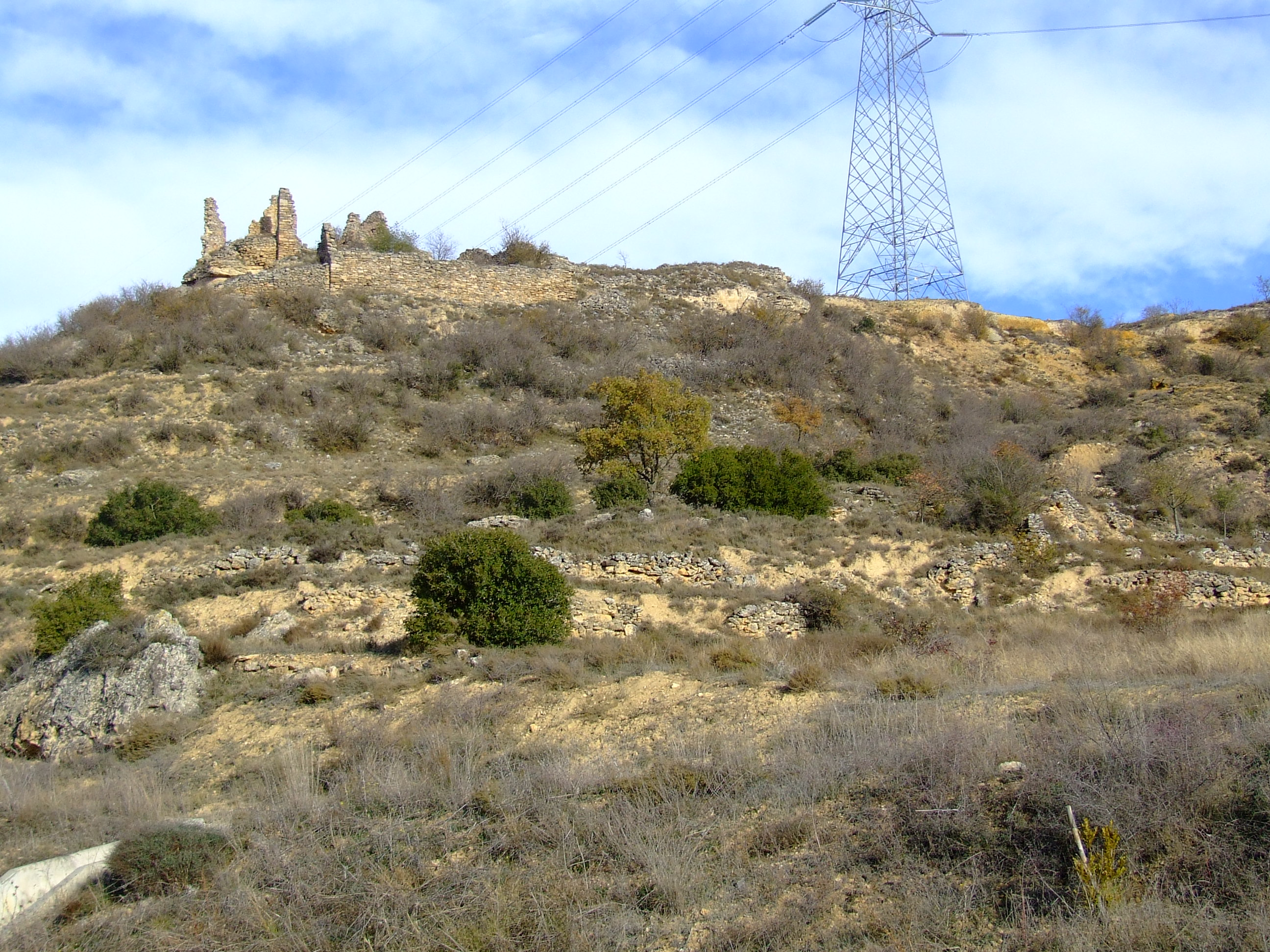 Vista general del castell de Castelltallat, a Conques, Isona i Conca Dellà.